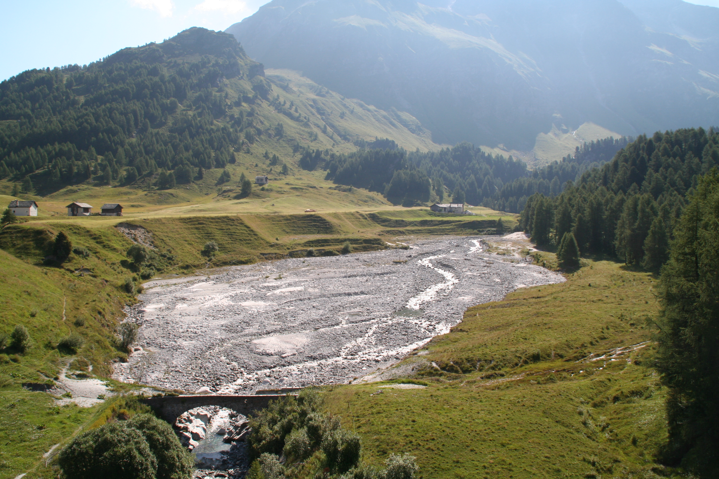 Culurs Rückhaltebeckn Richtung Salecina